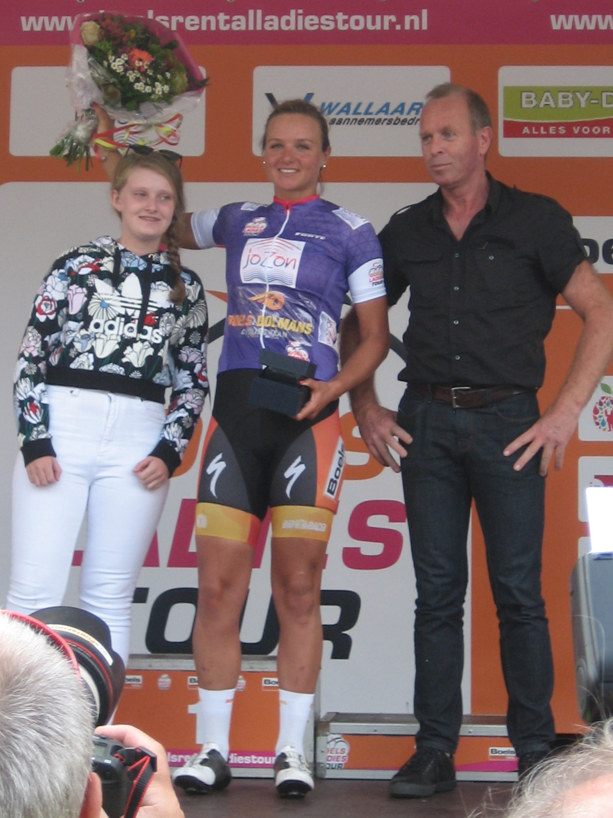 Chantal Blaak, leider in combinatieklassement na de derde etappe van de Boels Ladies Tour 2016 in Sittard, Limburg.